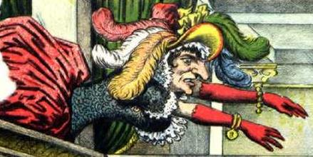 Η Ανθούσα Ροζού στο θεωρείο της Βουλής, από το περιοδικό Νέος Αριστοφάνης, 1888